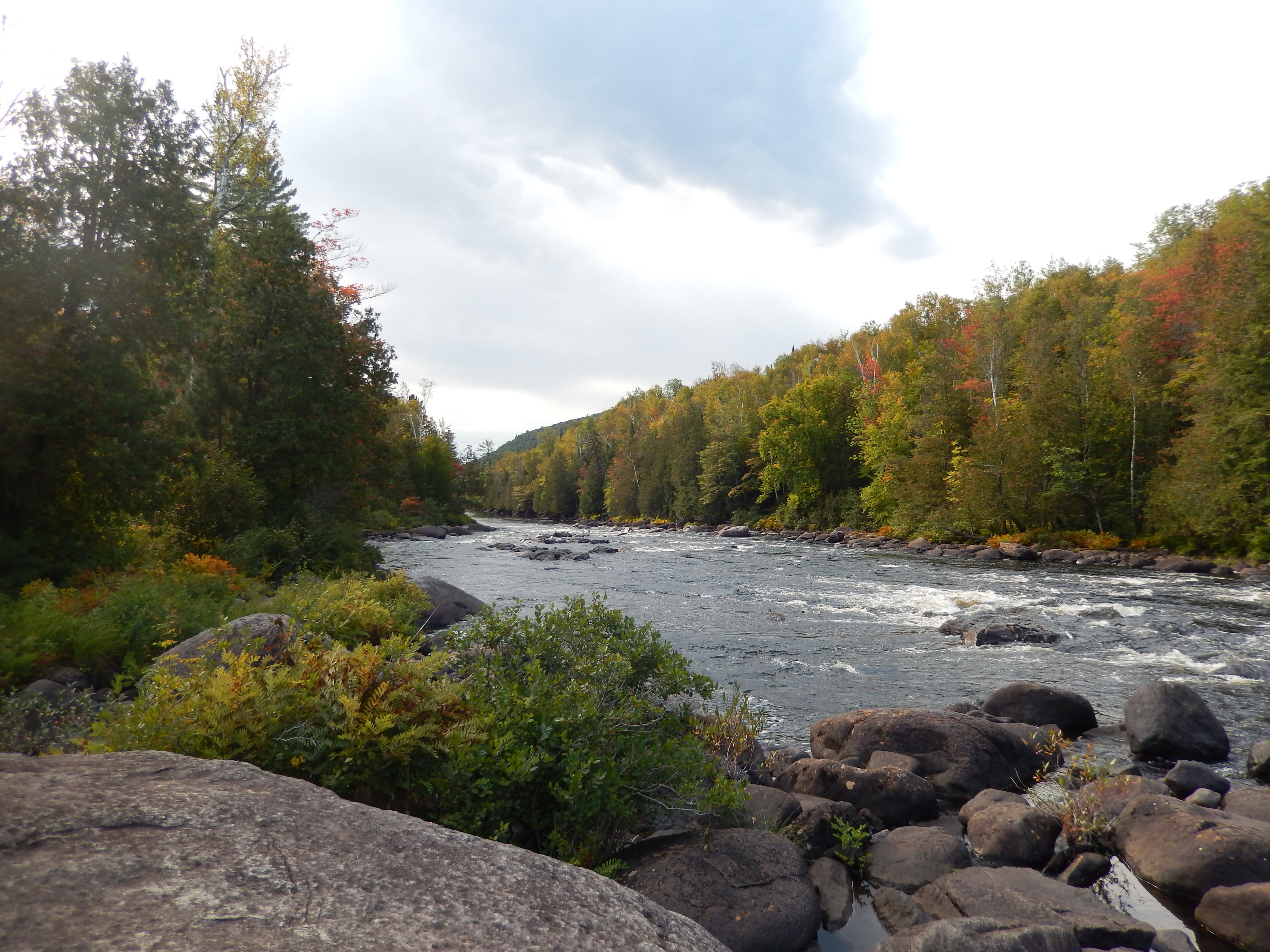 Rivière Ouareau dans le parc régional de la Forêt-Ouareau